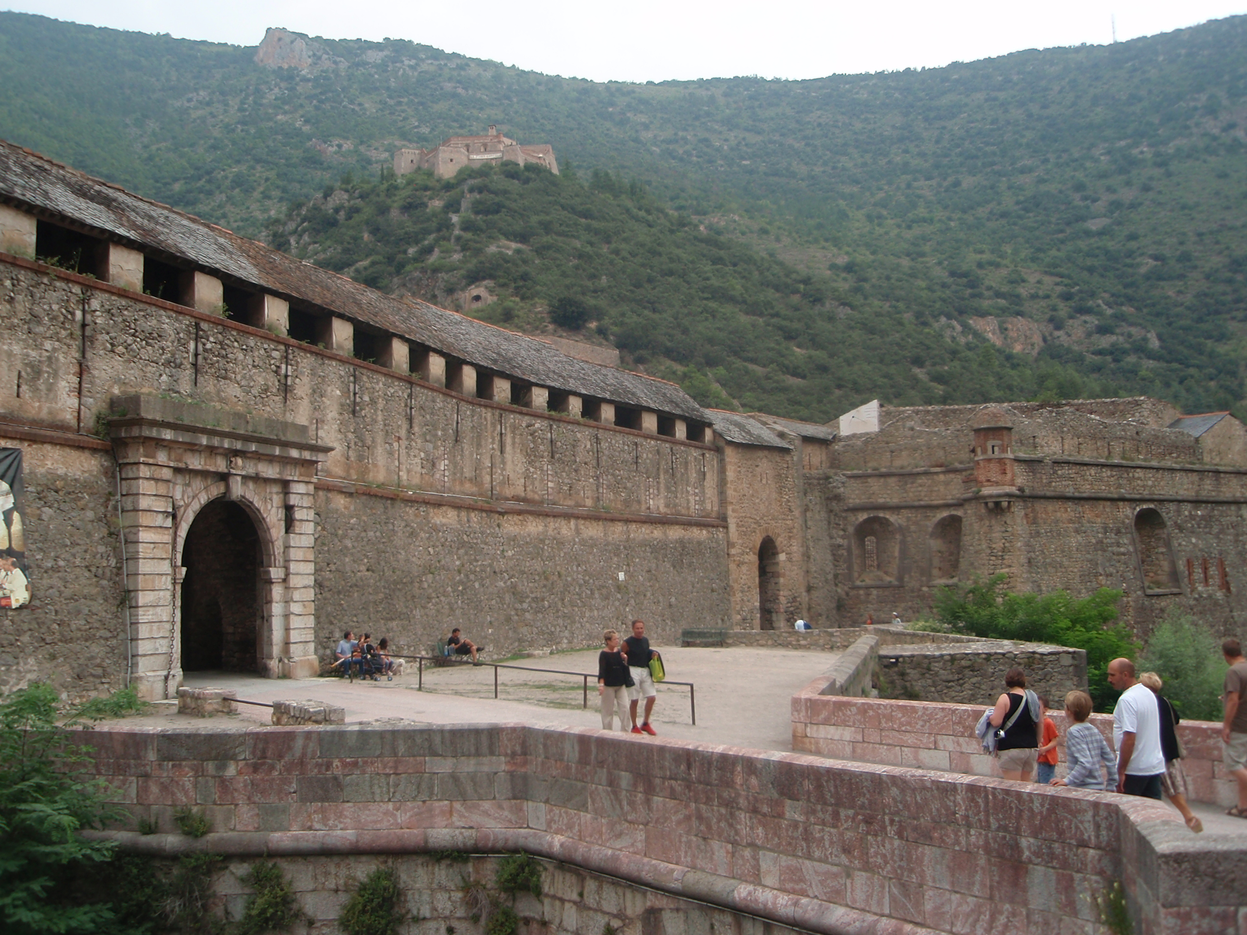 Porta Est, muralles i pont de la muralla de Vilafranca ed Conflent. Al fons Fort Libèria .